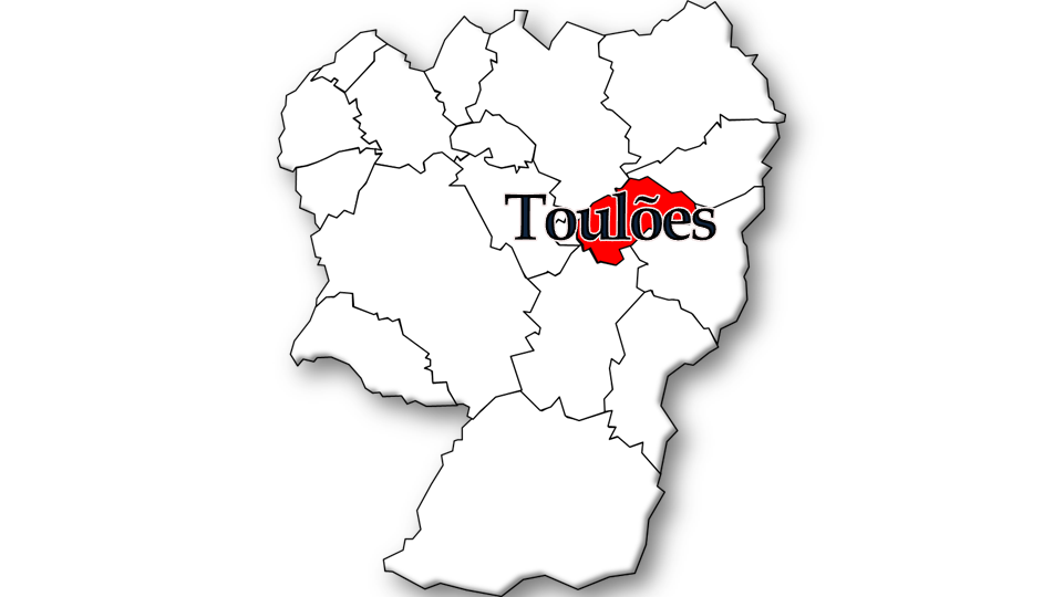 População